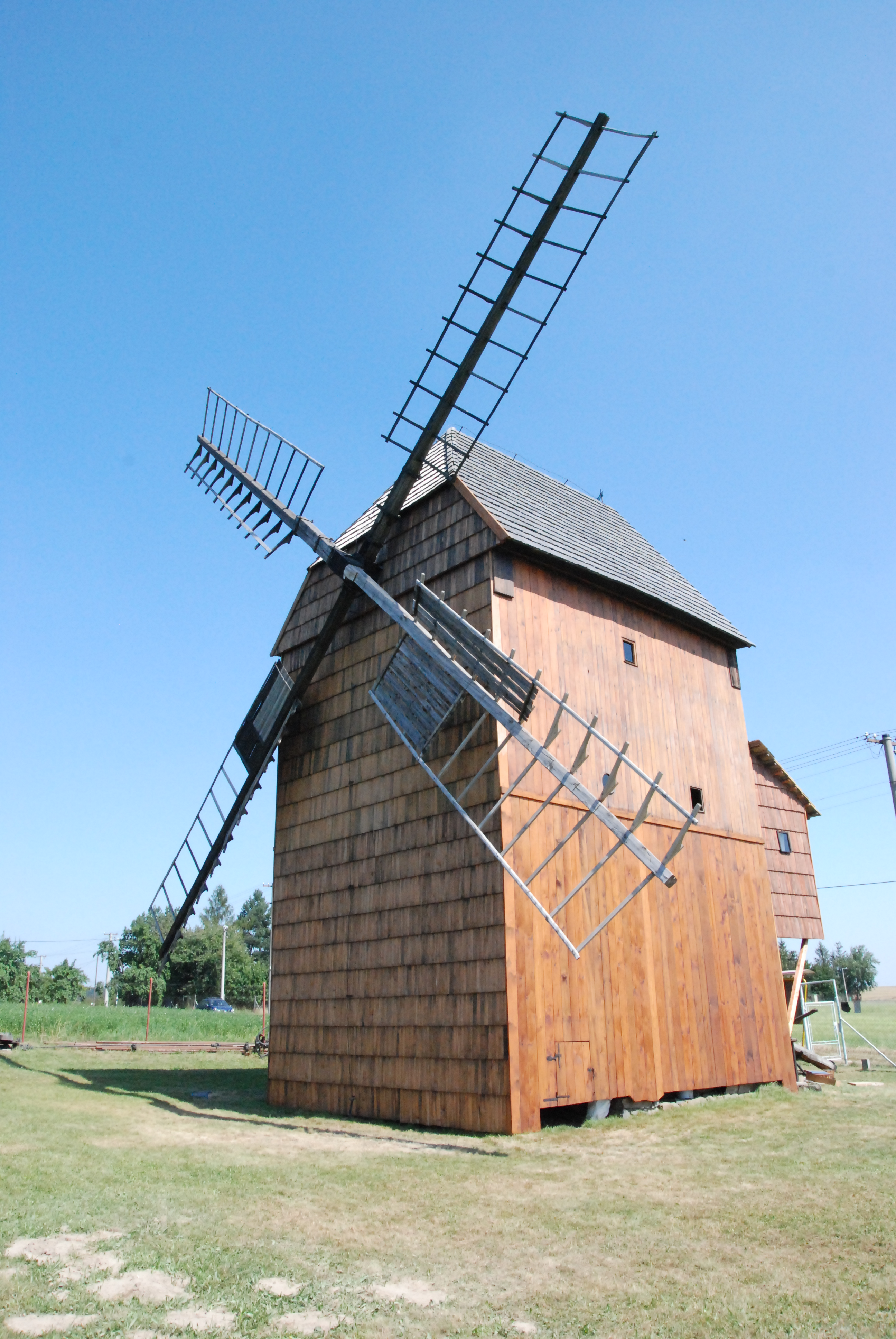 Větrný mlýn, při čp. 176, Choltice (Litultovice).